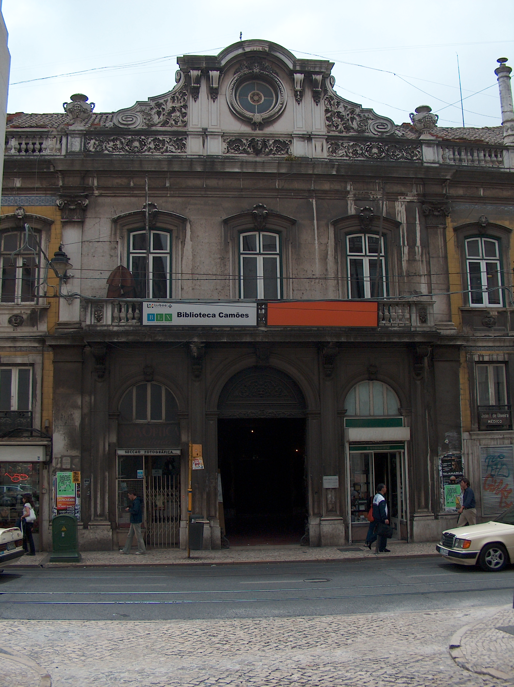 Palácio dos Condes de Azambuja